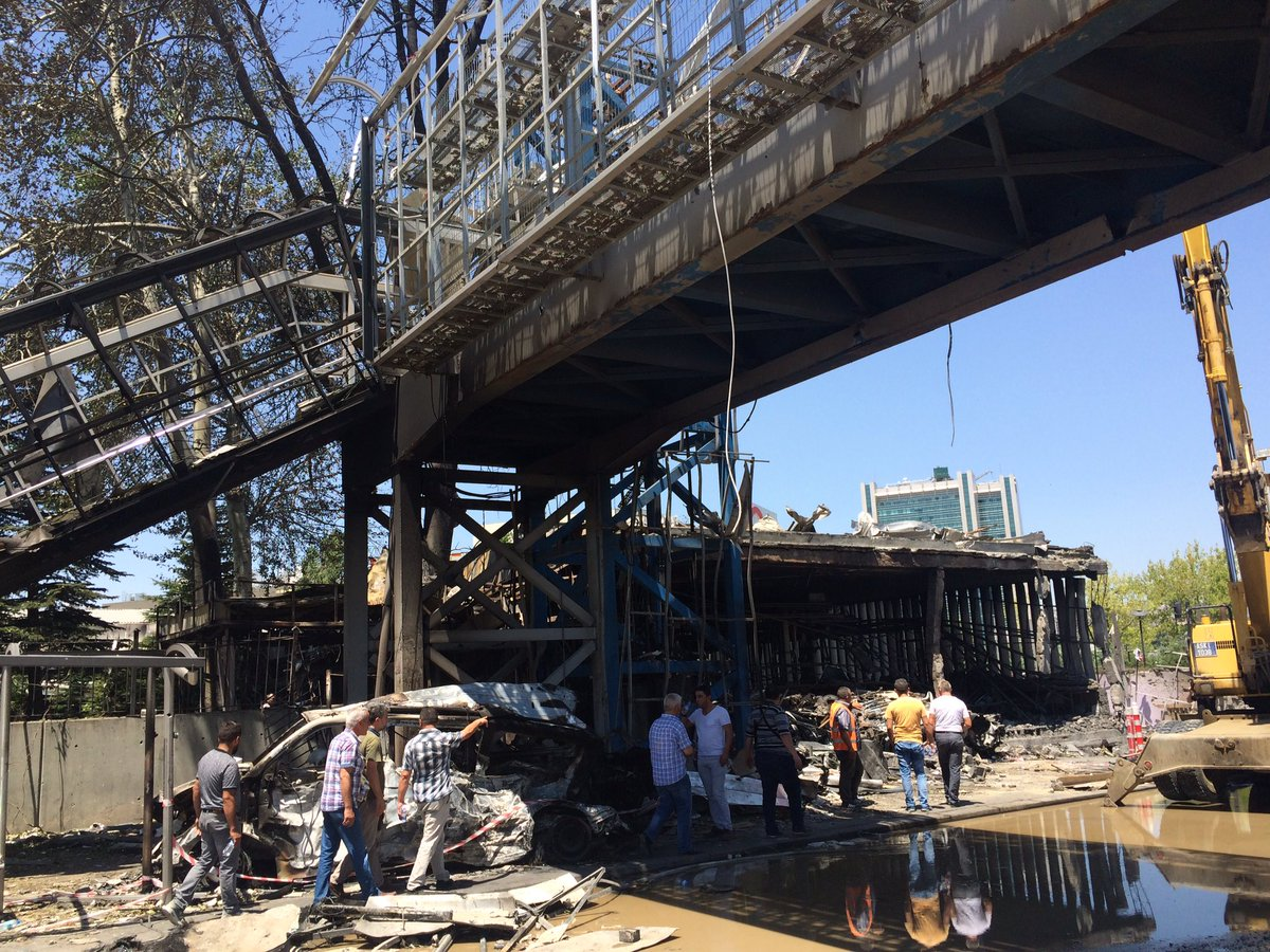 Fethullahçı Terör Örgütü (FETÖ/PDY) mensuplarıncan bulunulan 15 Temmuz 2016 Türkiye askeri darbe girişimi sırasında darbeciler tarafından F-16lar tarafından bombalanan Emniyet Genel Müdürlüğü binası.